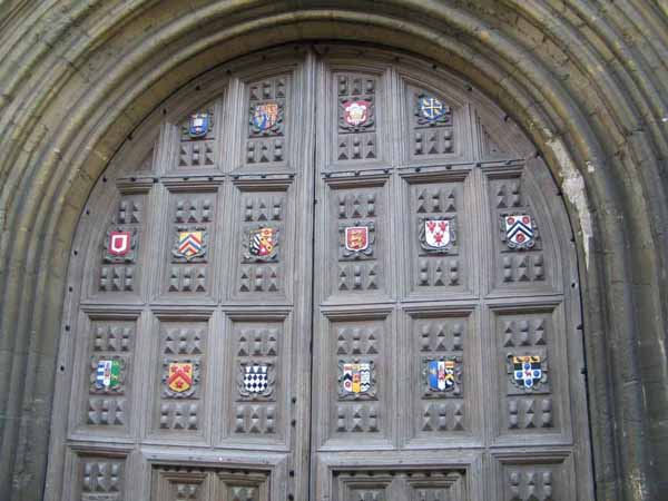 Bodleian图书馆。